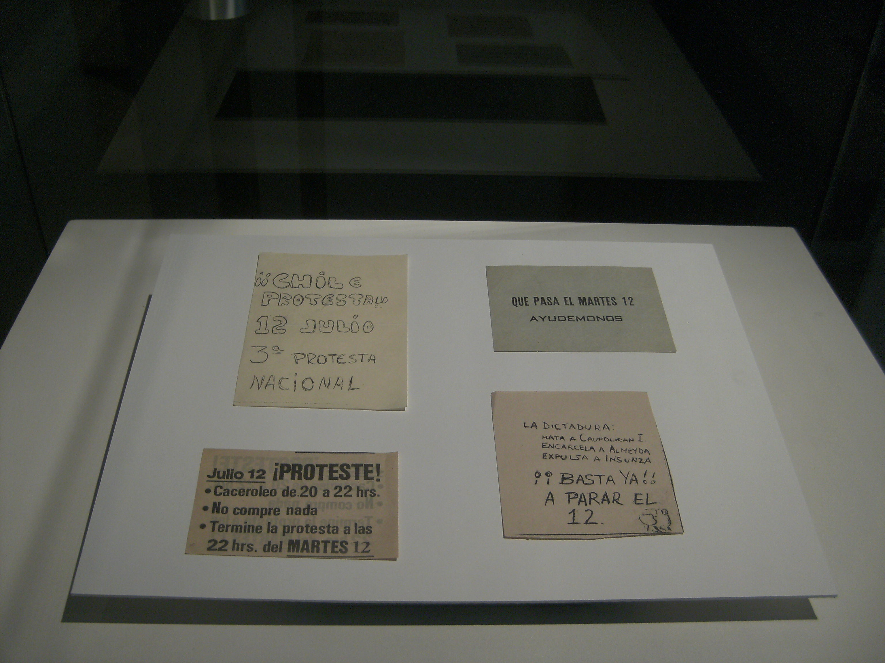 Aspectos del Museo de la Memoria y los derecho Humanos de Chile